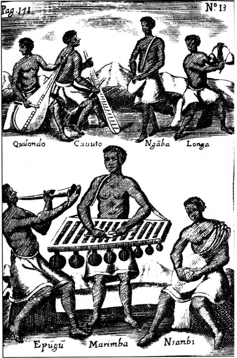 Gravure extraite de Girolamo Merolla da Sorrento, Breve e succinta relatione.... Naples, 1692